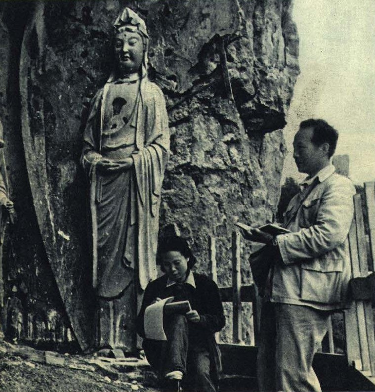 1962-05 1962年 麦积山石窟吴作人萧淑芳夫妇